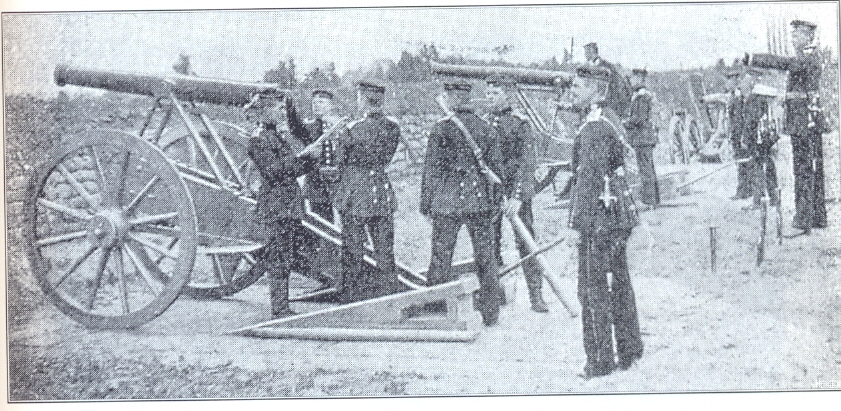 Bildunterschrift: 157. Fussartillerie-Geschützexerzieren in einer 9 cm Batterie. Nach einer Photographie von P. Haak, Köln